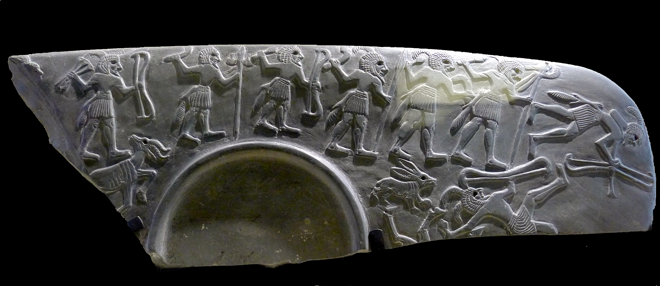 Palette (fragment) dite « de la chasse ».